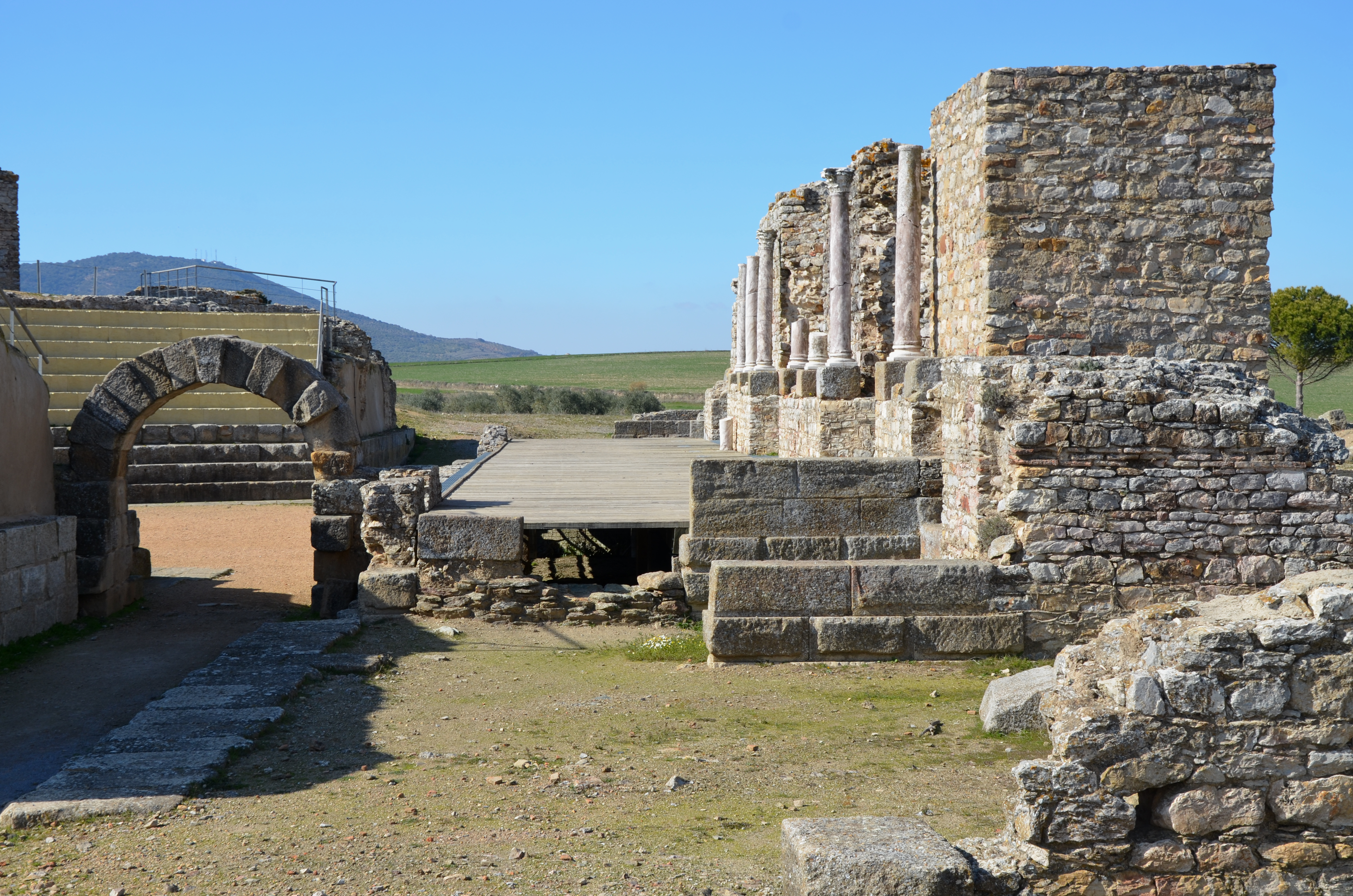 Regina Turdulorum, Extremadura, Spain